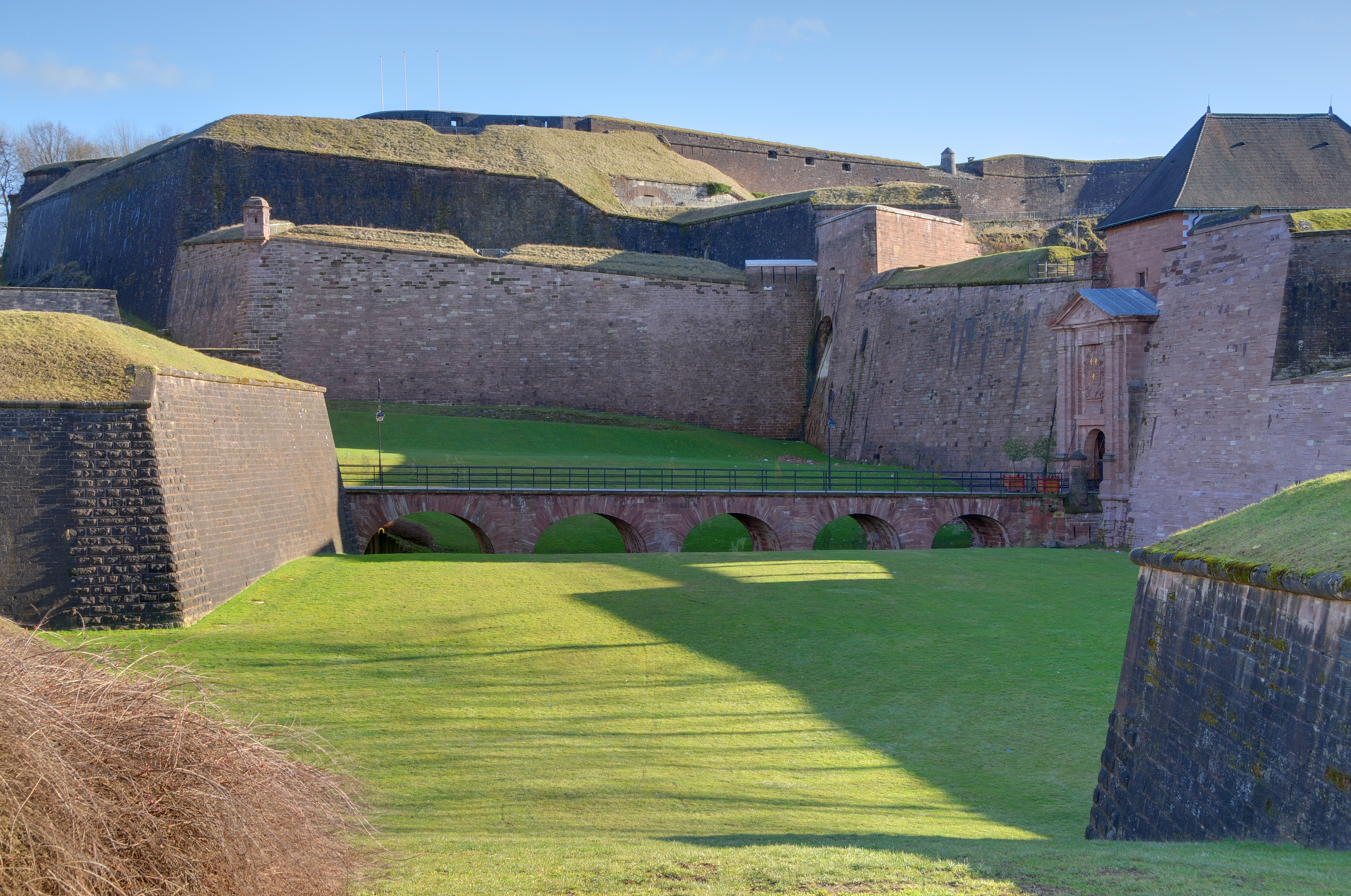 Fortifications à proximité de la Porte de Brisach, à Belfort (HDR).